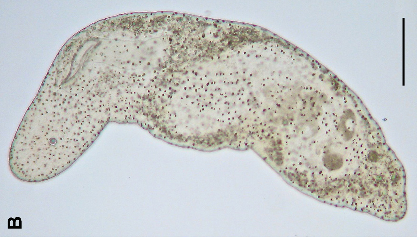 Proporus sp. -Acoela